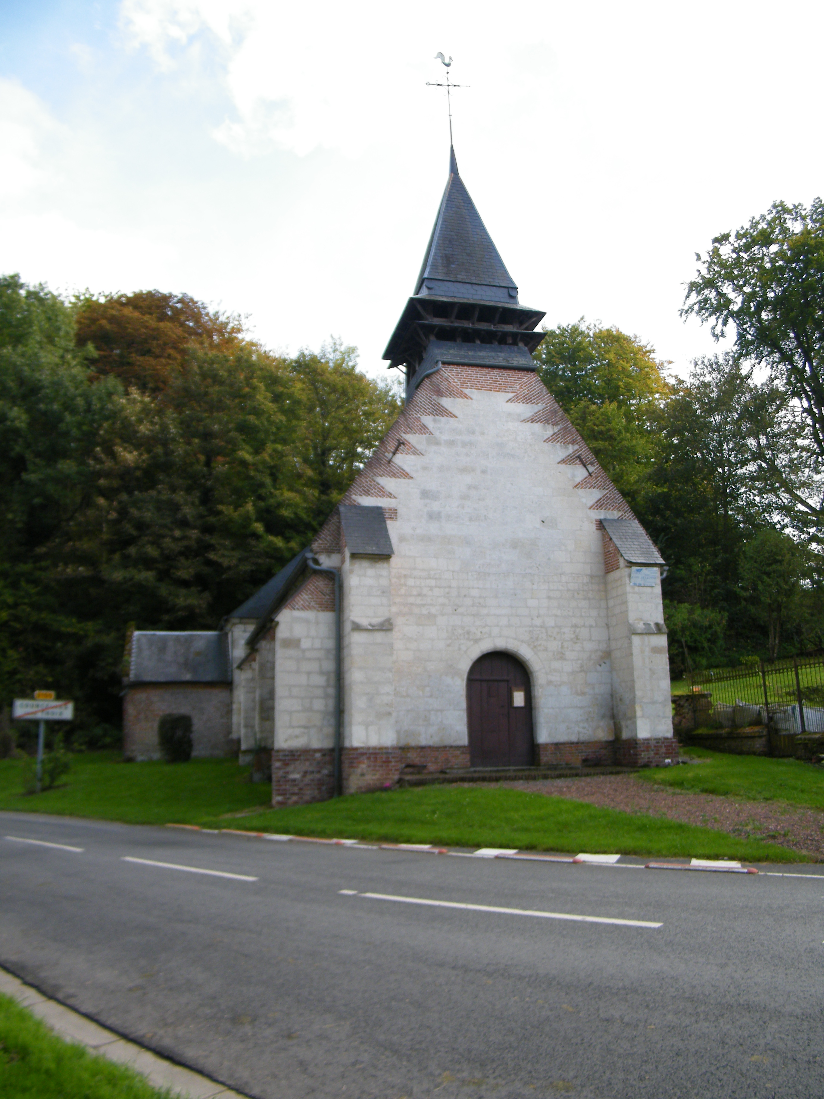 église.